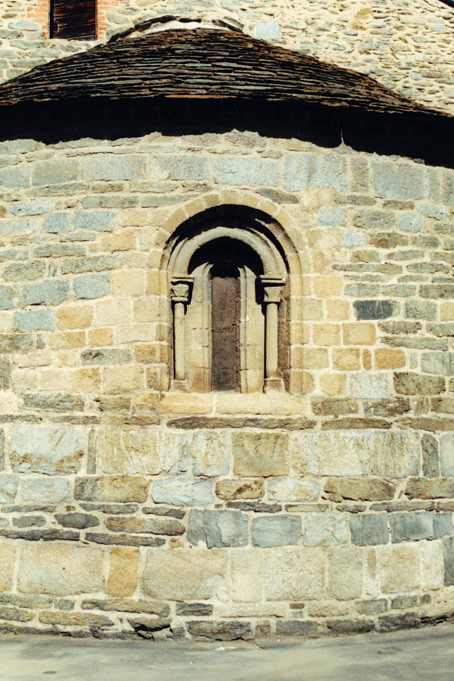 Església de Sant Pere d'Oceja (Alta Cerdanya)